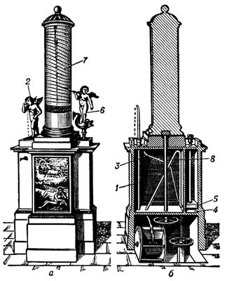 КлепсидраКлепсидра (водяные часы)